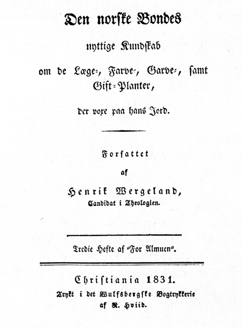 Tredje hefte av Henrik Wergelands «For Almuen», 1831.